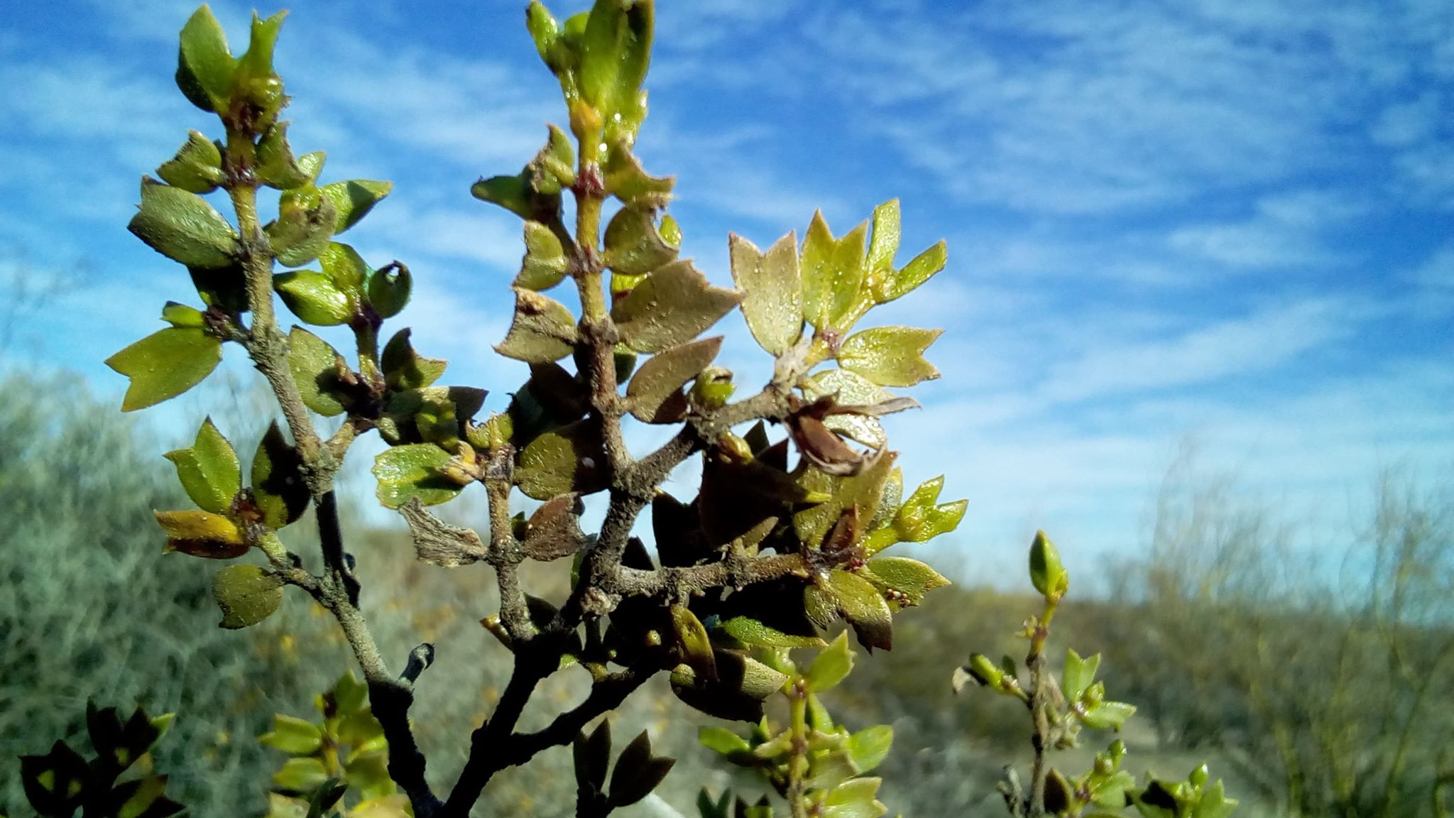 Larrea cuneifolia en la localidad de Paso Córdova ciudad de General Roca, Provincia de Río Negro, Argentina.